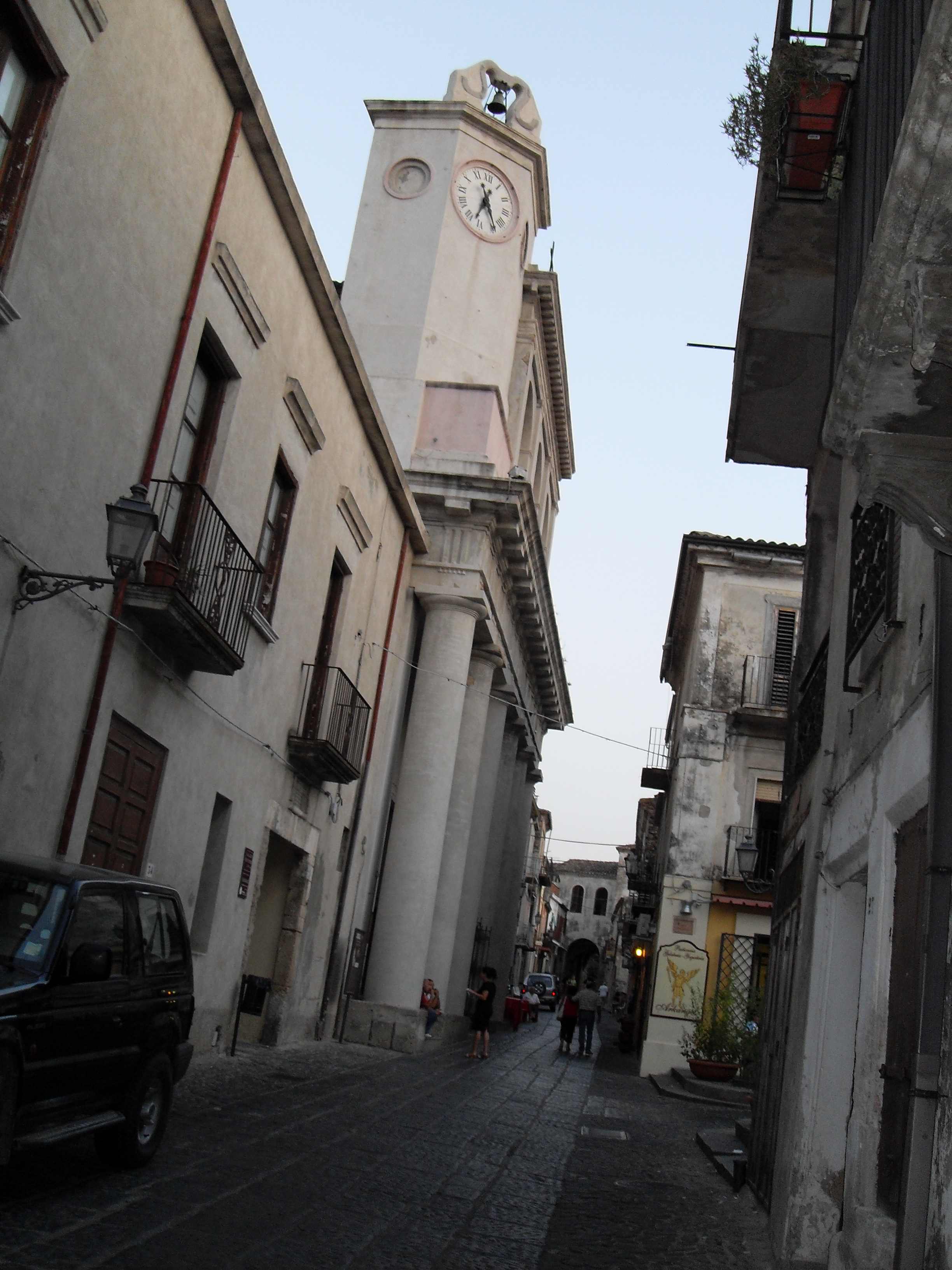 Cariati - cattedrale corso XX settembre